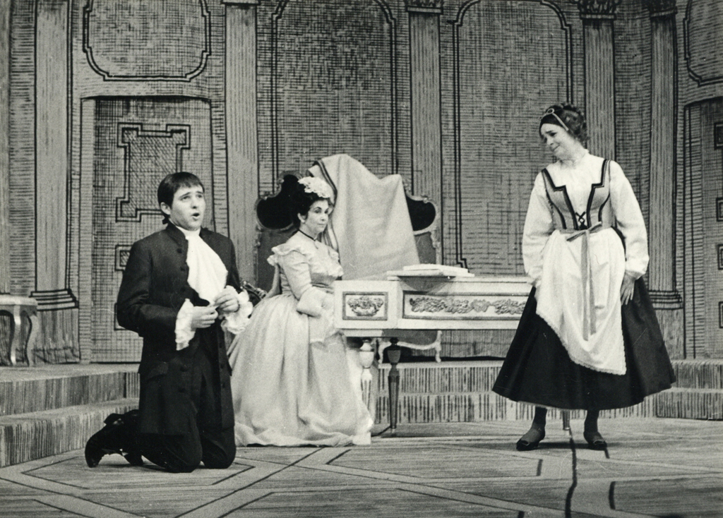 Anton Tomaž Linhart, Ta veseli dan ali Matiček se ženi, Drama SNG v Ljubljani. Na fotografiji: Janez Hočevar (Tonček), Ančka Levar (Rozala), Majda Potokar (Nežka).